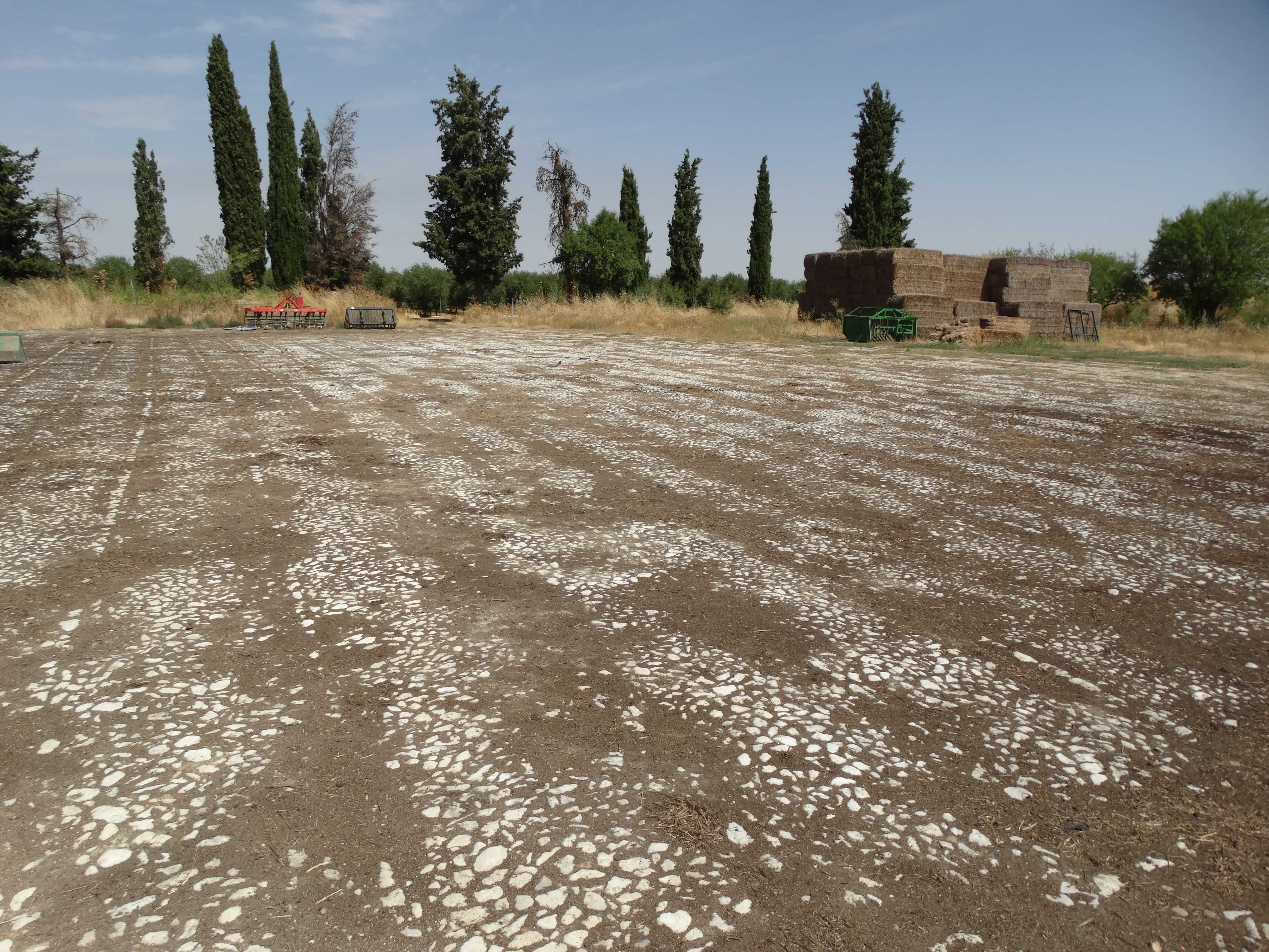 Paraje del Páramo de Valdecuevas, en el término municipal de Medina de Rioseco, provincia de Valladolid (España). Este paraje fue testigo de la batalla de Rioseco entre los ejércitos españoles (Ejército de Galicia) y franceses (guerras napoleónicas). Está muy cerca del teso El Moclín. En la foto se ven los restos de una antigua era. Todo el páramo está ocupado por una empresa de aceites y sus consiguientes plantaciones.